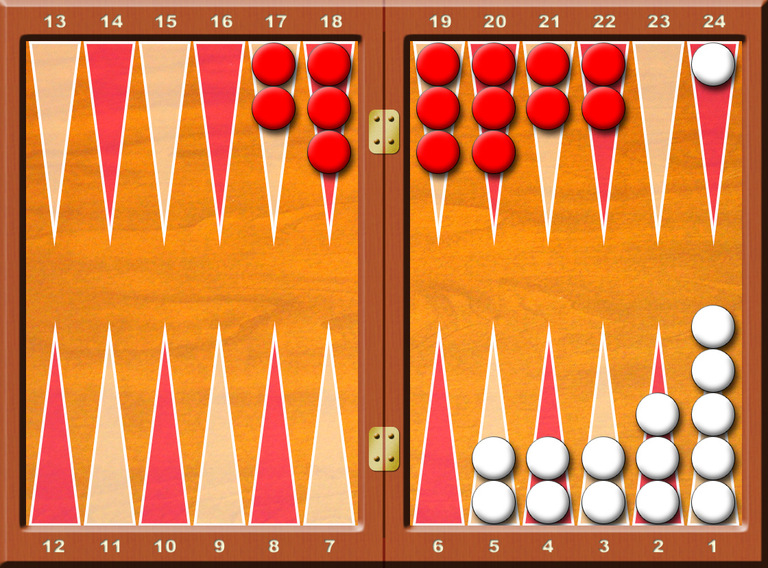 Backgammon--Esempio di blocco Francesco De Lorenzo (fr.dl CHIOCCIOLA tiscali.it) è l'autore di questa immagine e l'ha rilasciata sotto licenza GFDL